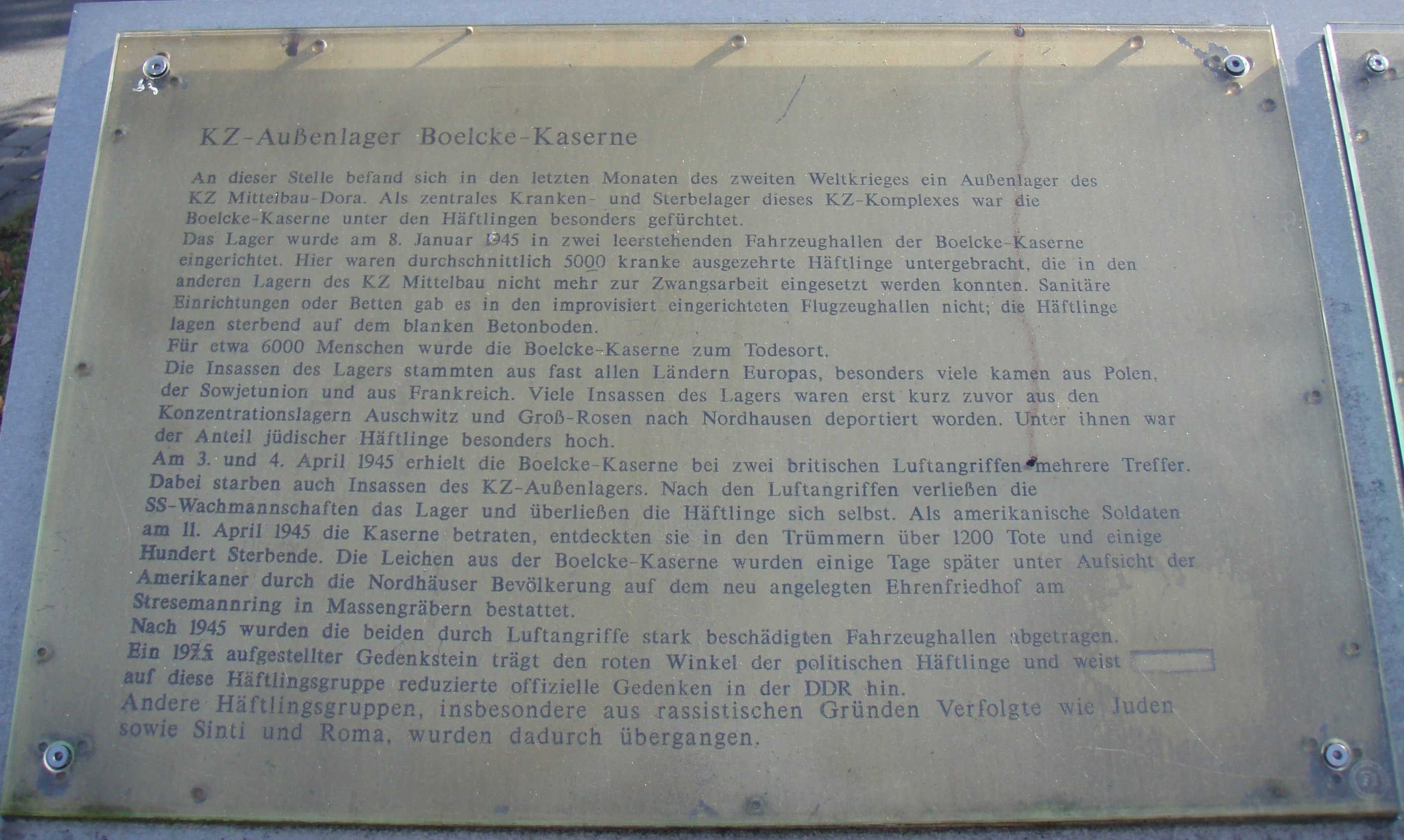 Gedenktafel für die Toten im Außenlager der Boelcke-Kaserne in Nordhausen